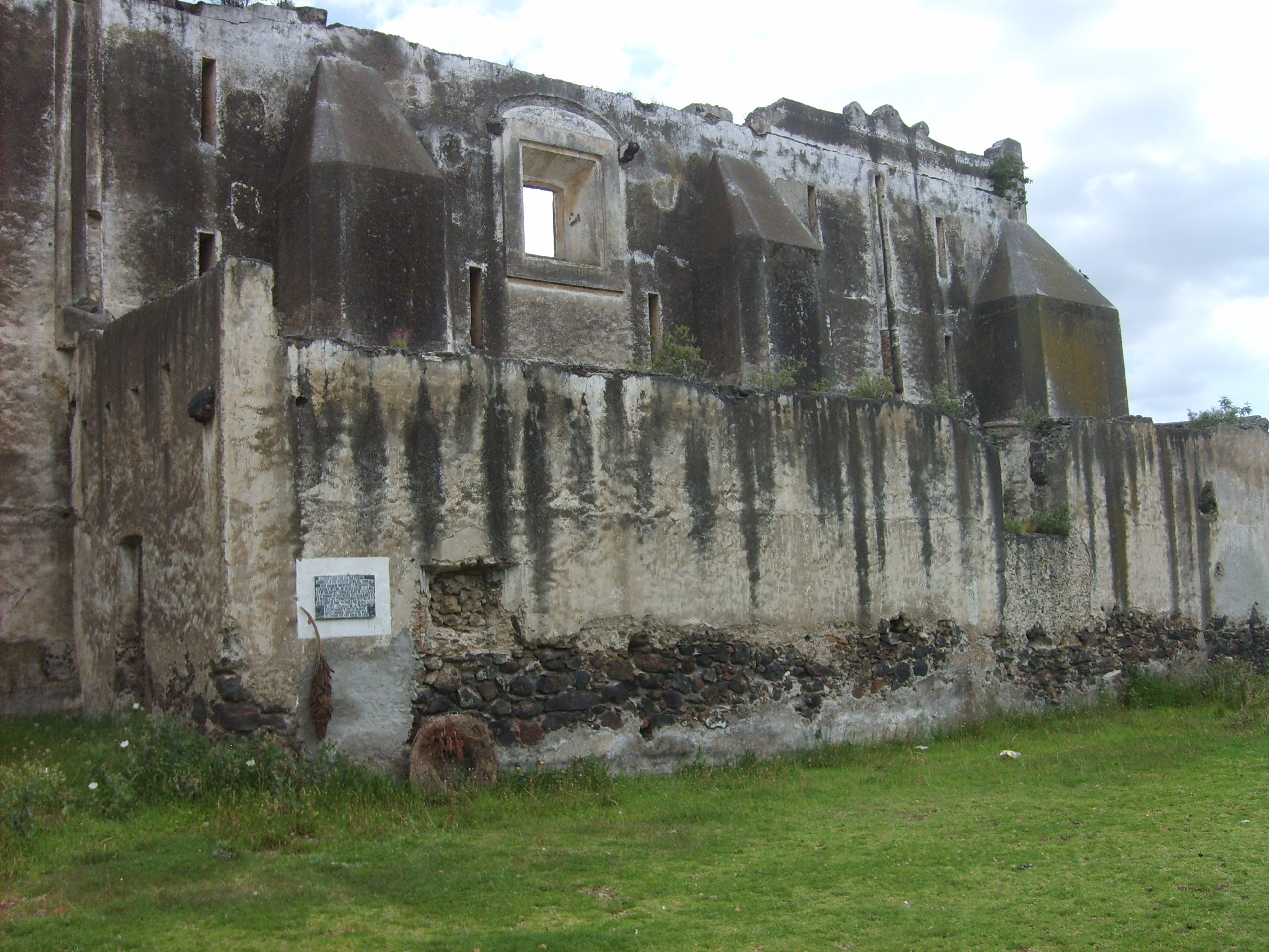 Muro exterior y patio de colecturía de los diezmos de San Andrés donde sucedio la explosión del 6 de marzo de 1862